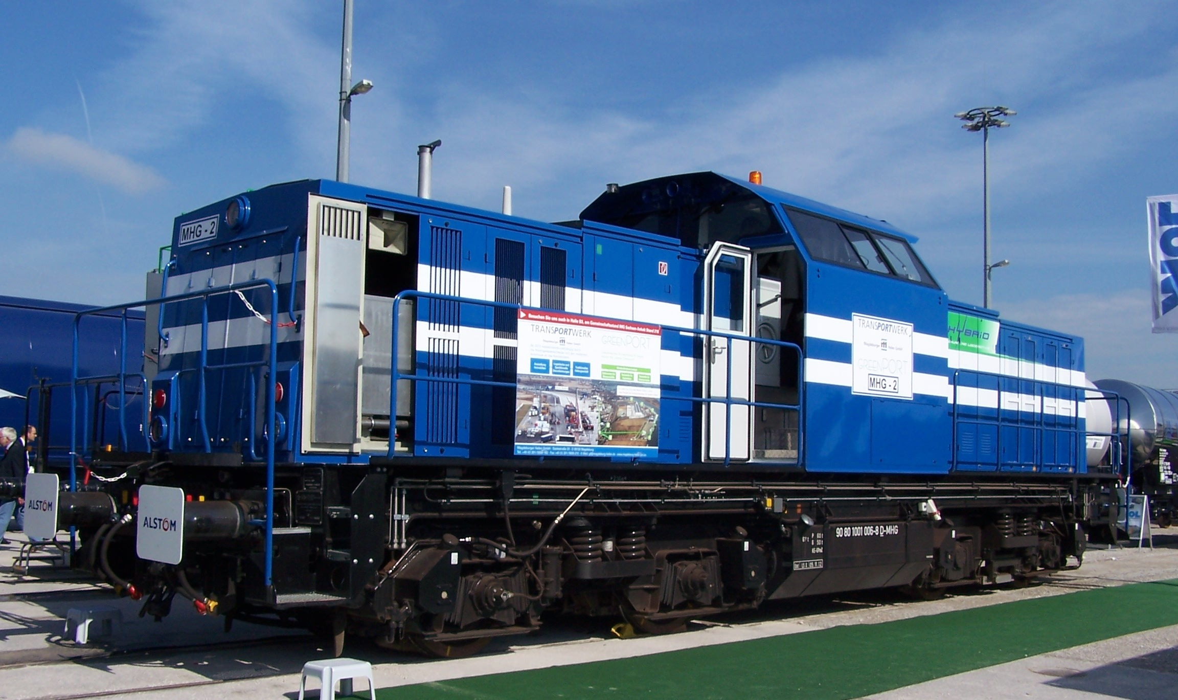 MHG (Magdeburger Hafengesellschaft) 2 durch ALSTOM Stendal aufgearbeitet